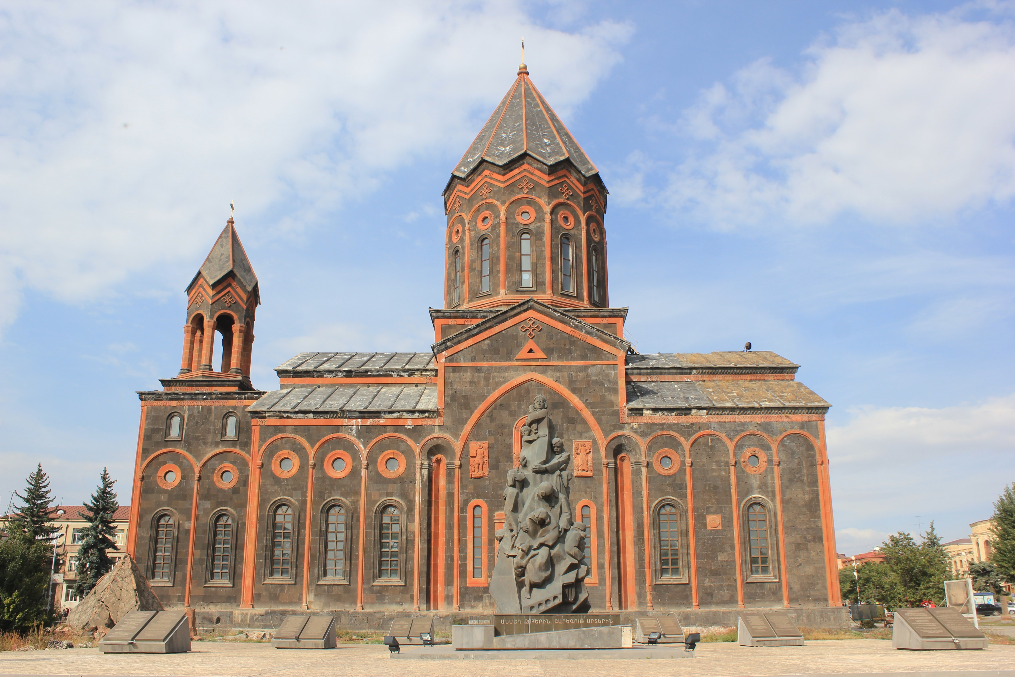 Wiederaufgebaute Erlöserkirche in Gjumri.